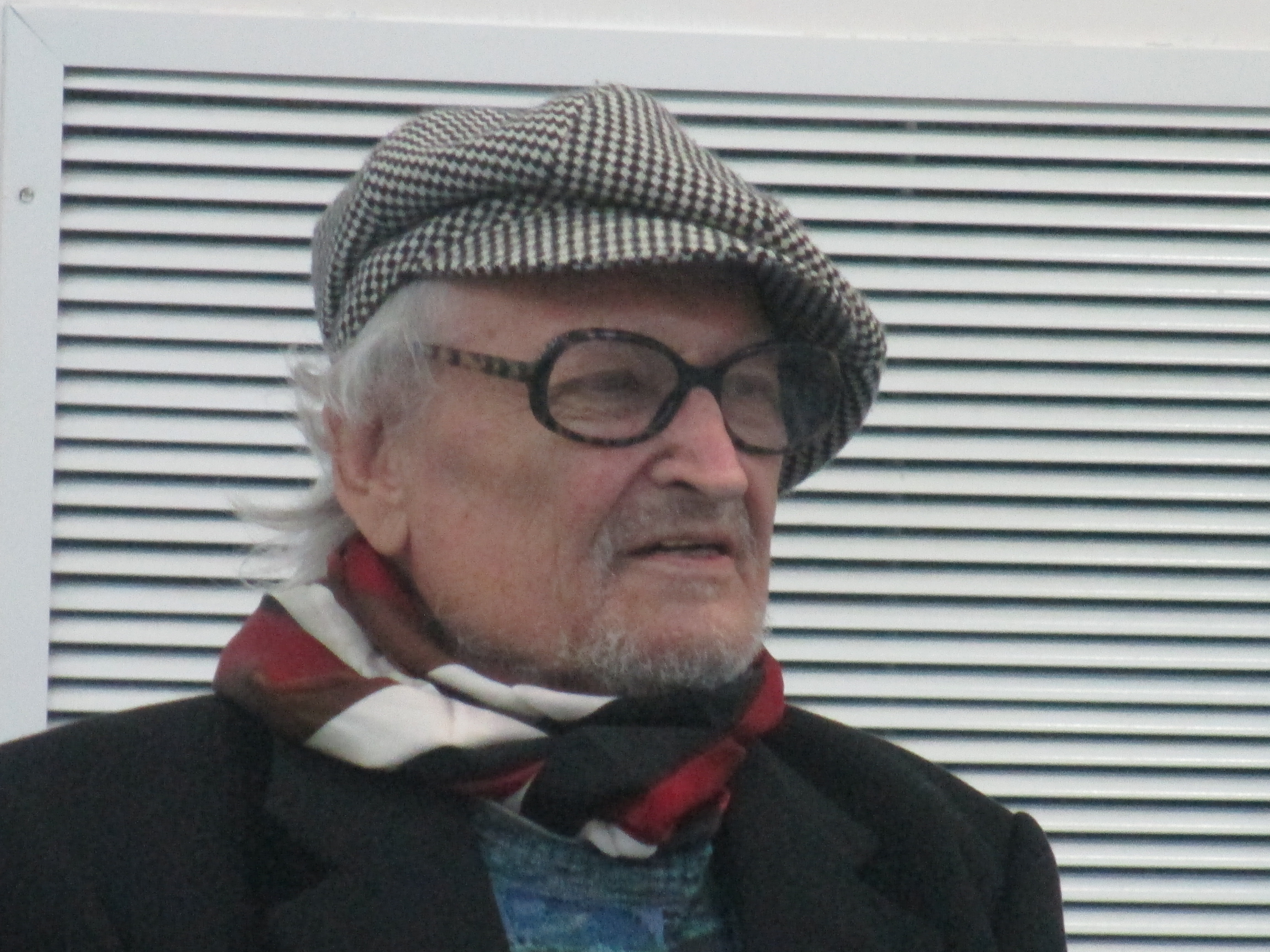 ולרי פאנוב - צולם בבית הספר לבלט באשדוד